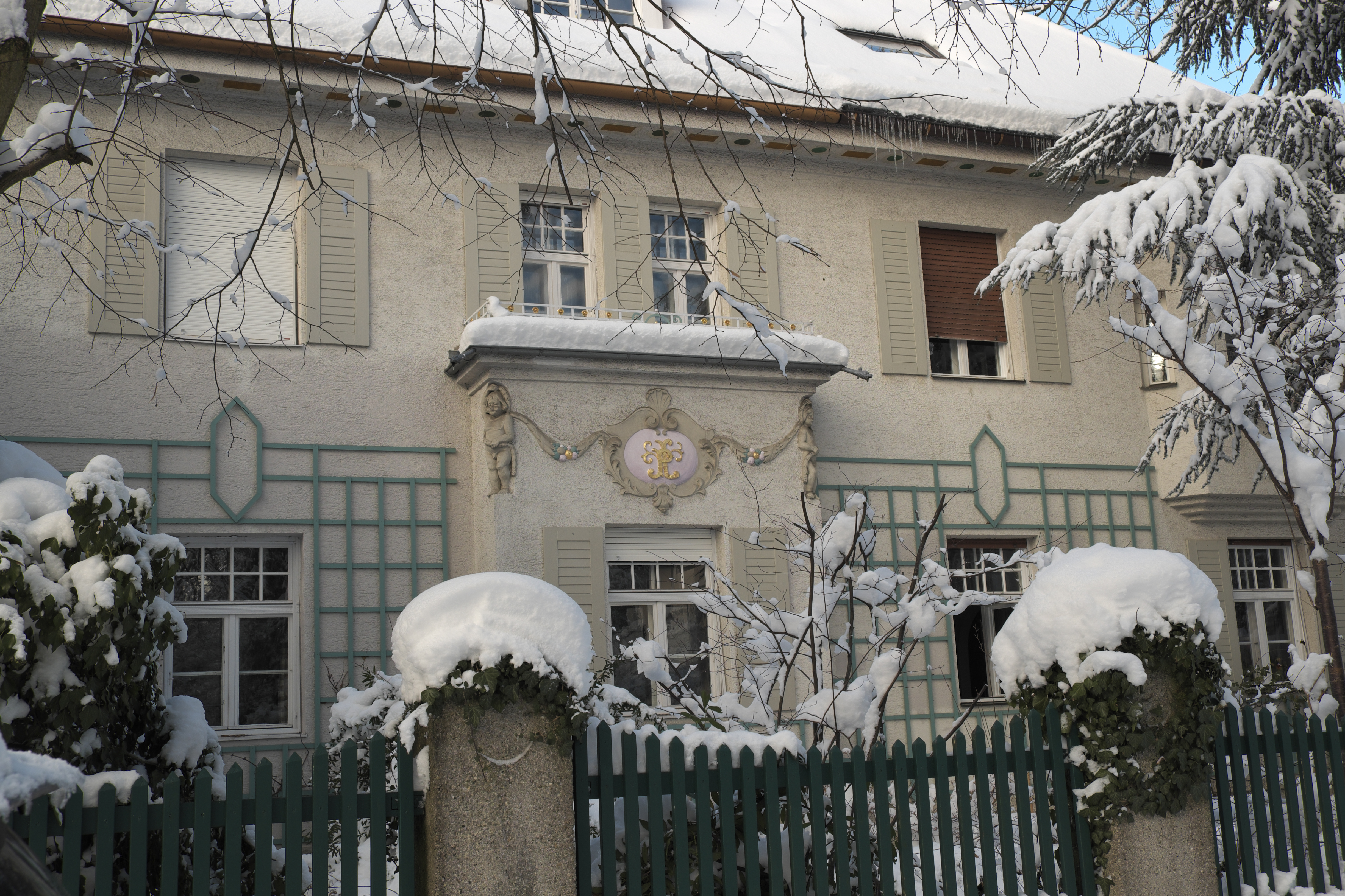 Villa in der Floßmannstraße 9/11 in Pasing im Stadtbezirk Pasing-Obermenzing in München (Bayern/Deutschland), 1911 von Feodor Elste erbaut